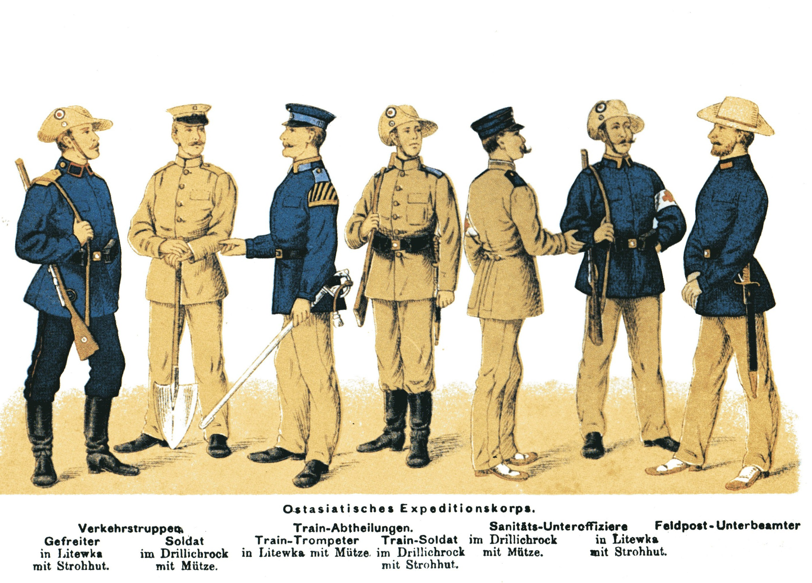 Angehörige des Ostasiatischen Expeditionskorps um 1901 in Litewken und khakifarbenen Drillichröcken. Zeitgenössische Darstellung